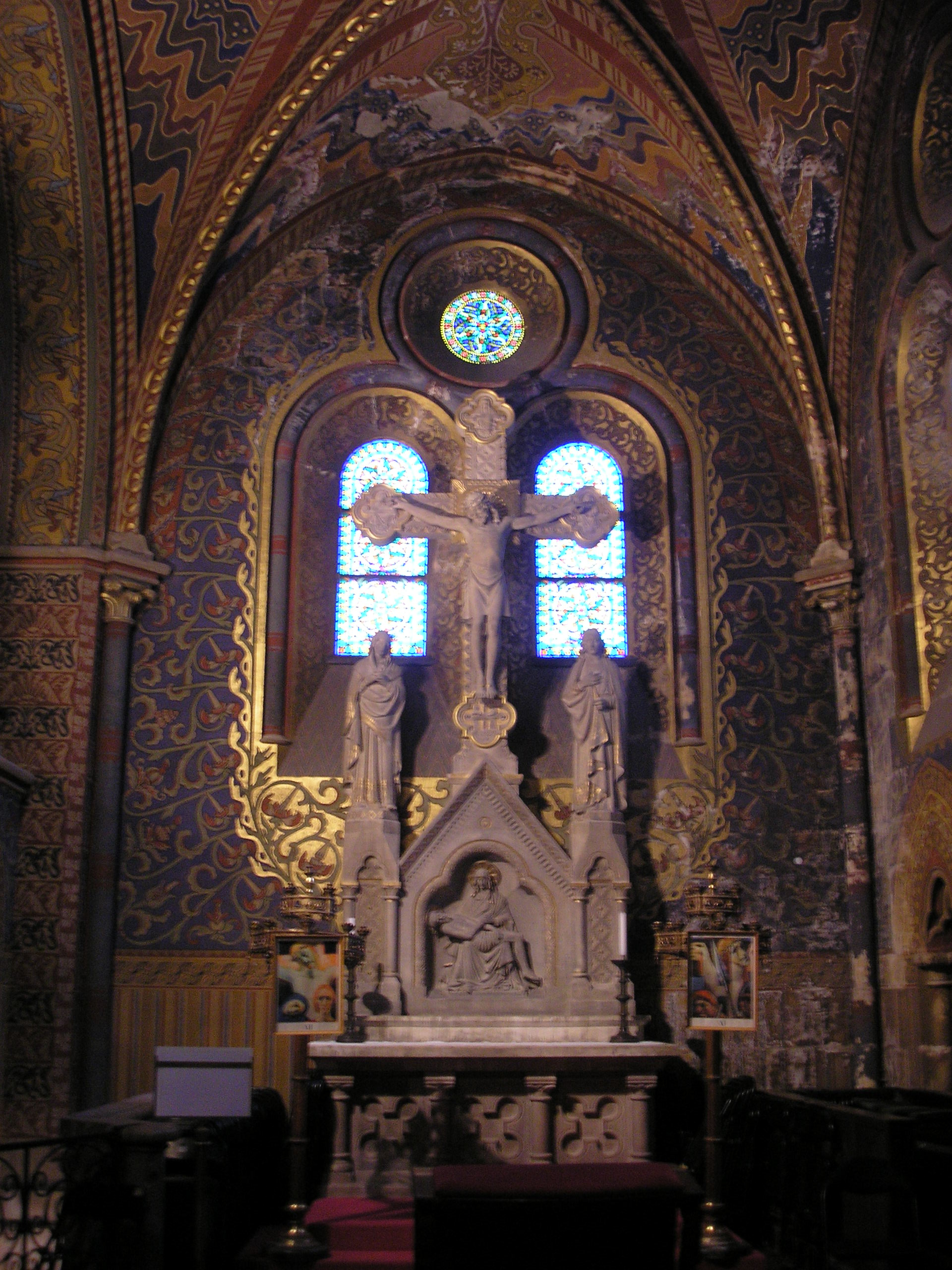 Heilig Kreuz Kapelle in der Matthiaskirche, Budapest, Ungarn.